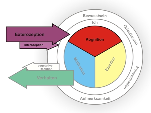 Modell zur menschlichen Psyche, Kognition